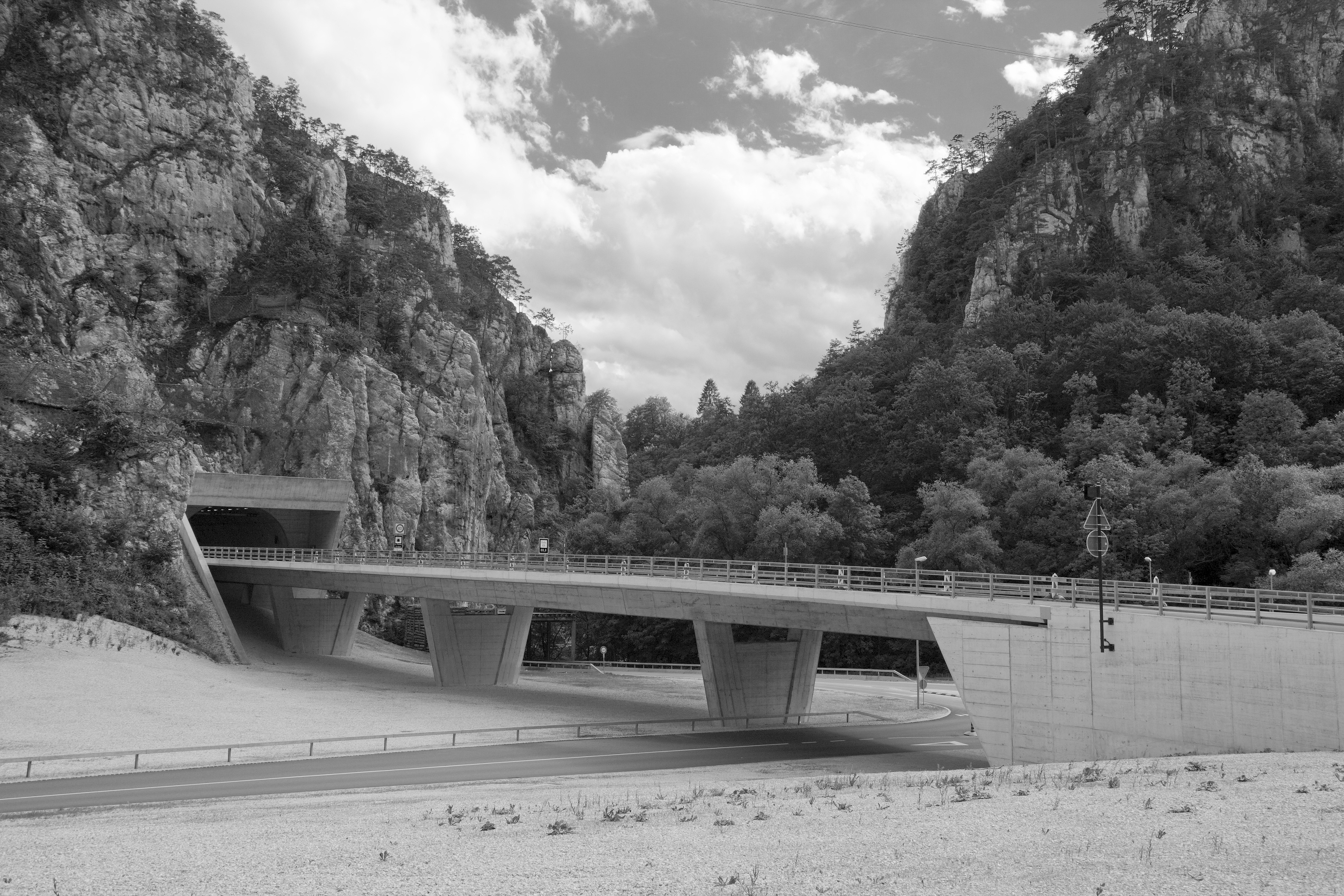 Autobahnbrücke der A16 «Transjurane» bei Choindez, Schweiz Auf dem mittleren Brückenpfeiler habe ich eine Schmiererei wegretouchiert